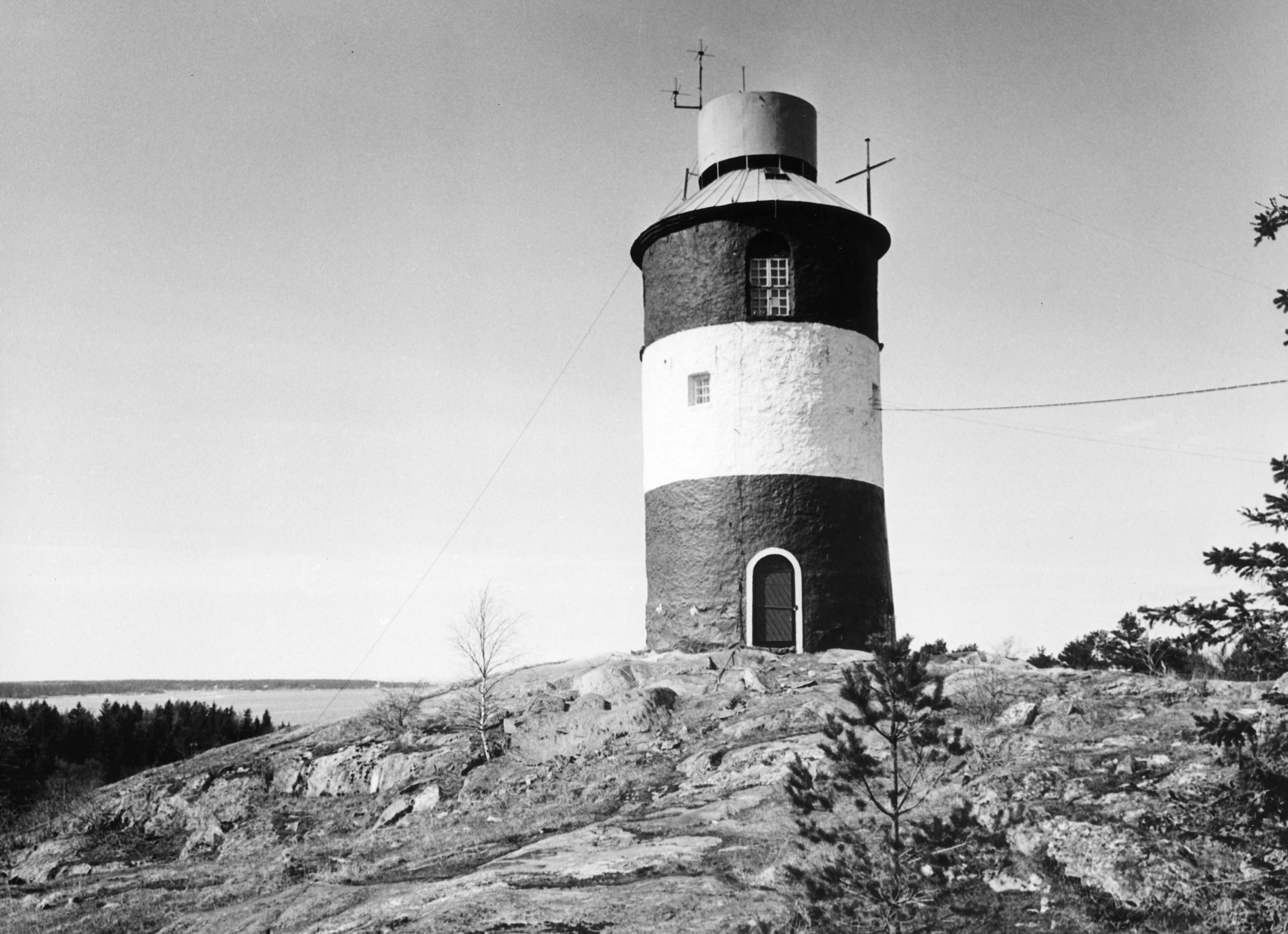 Arholma_båk